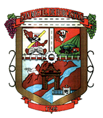 Escudo del municipio sonorense.